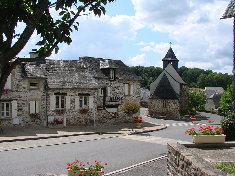 le bourg